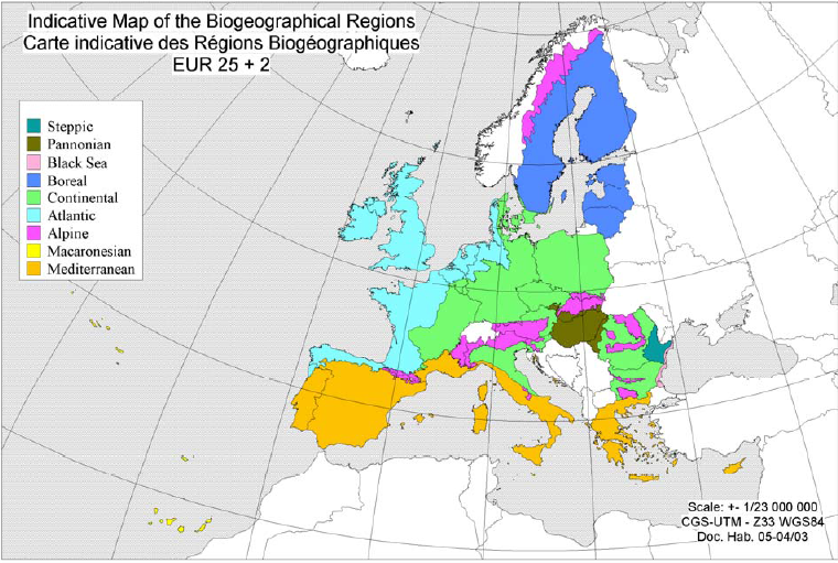 Схема біогеографічного поділу Європи станом на 2006 рік